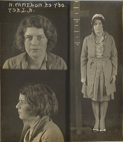 Nellie Cameron